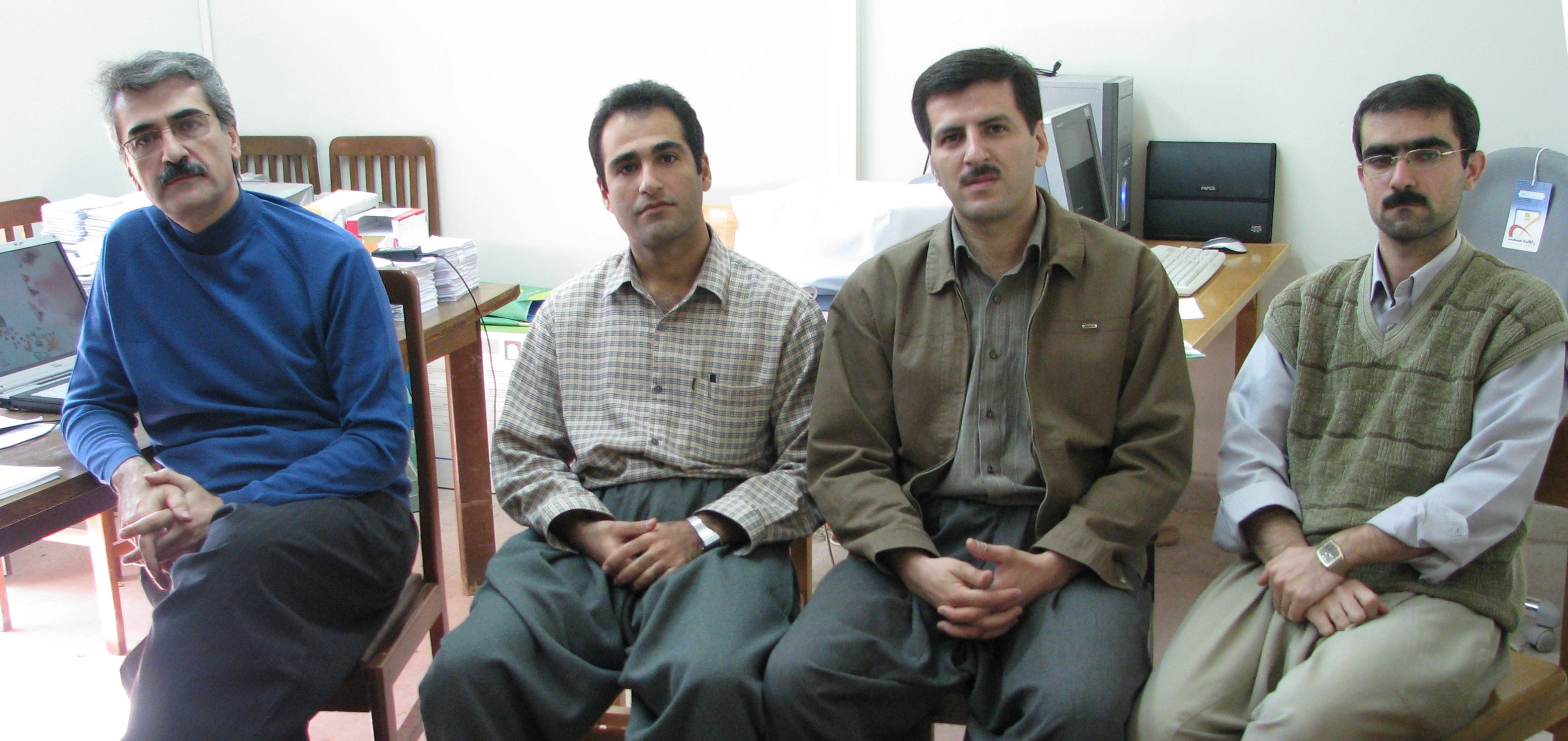 کوردی: دەستەی نڤیسیارانی فەرهەنگی فارسی کوردی زانستگای کورستان